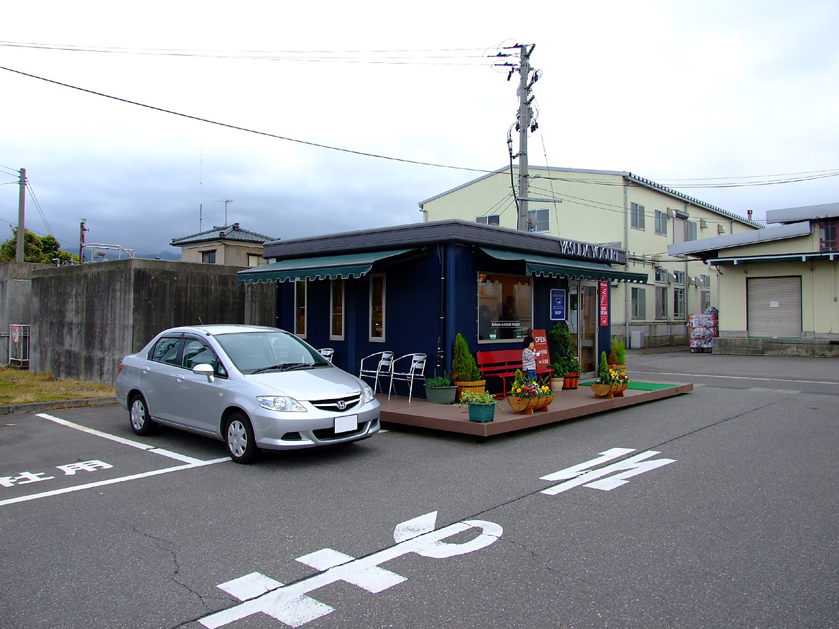 新潟県阿賀野市保田にあるヤスダヨーグルトの直売所。